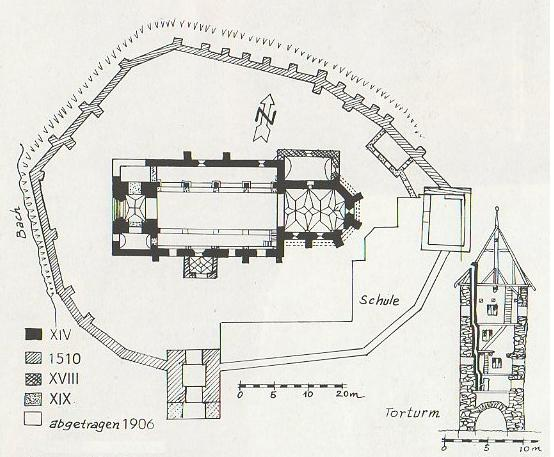 Planul fortificatiei din Brateiu.